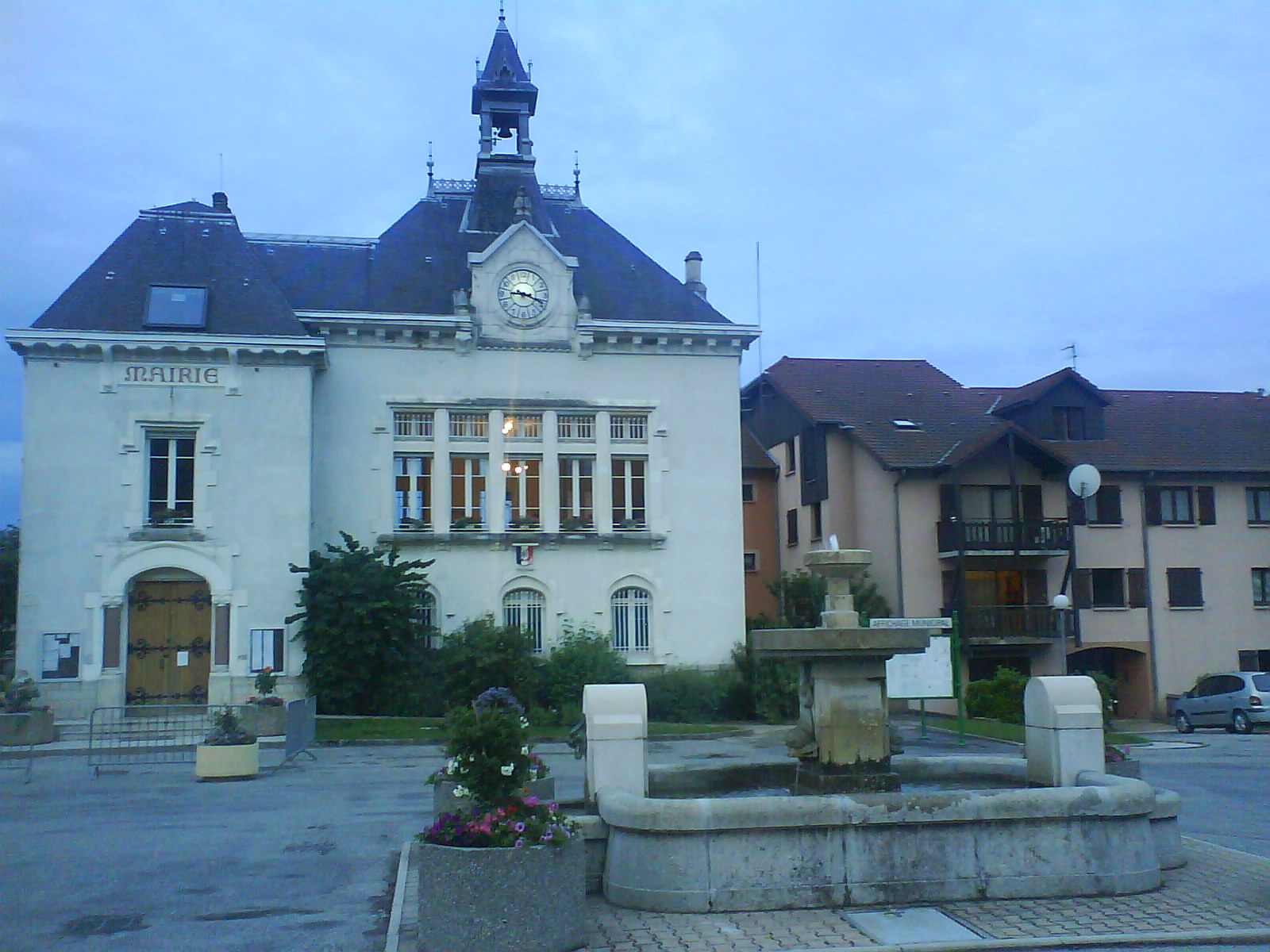 Mairie de Chaparaillan